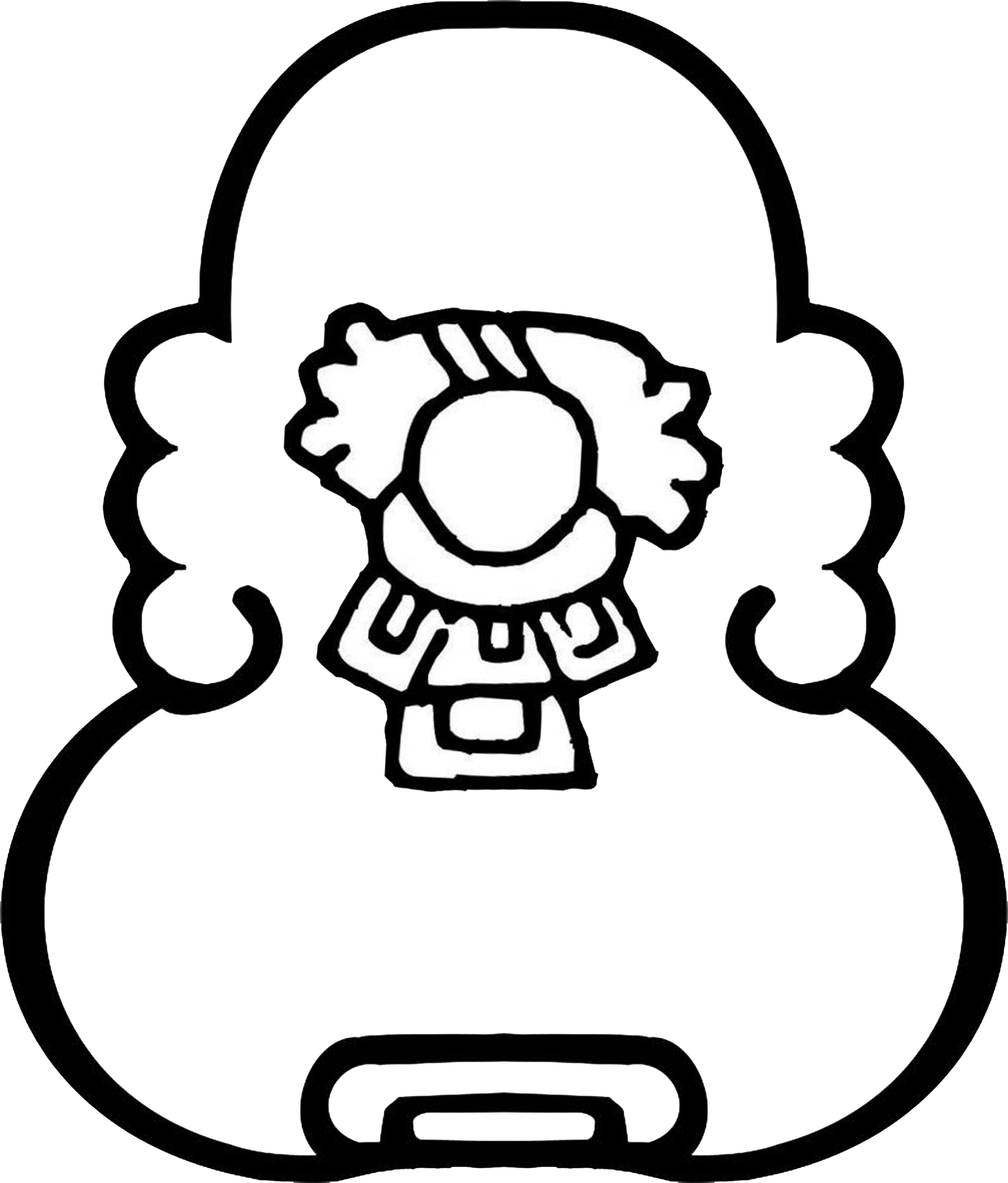 Glifo Teoloyucan